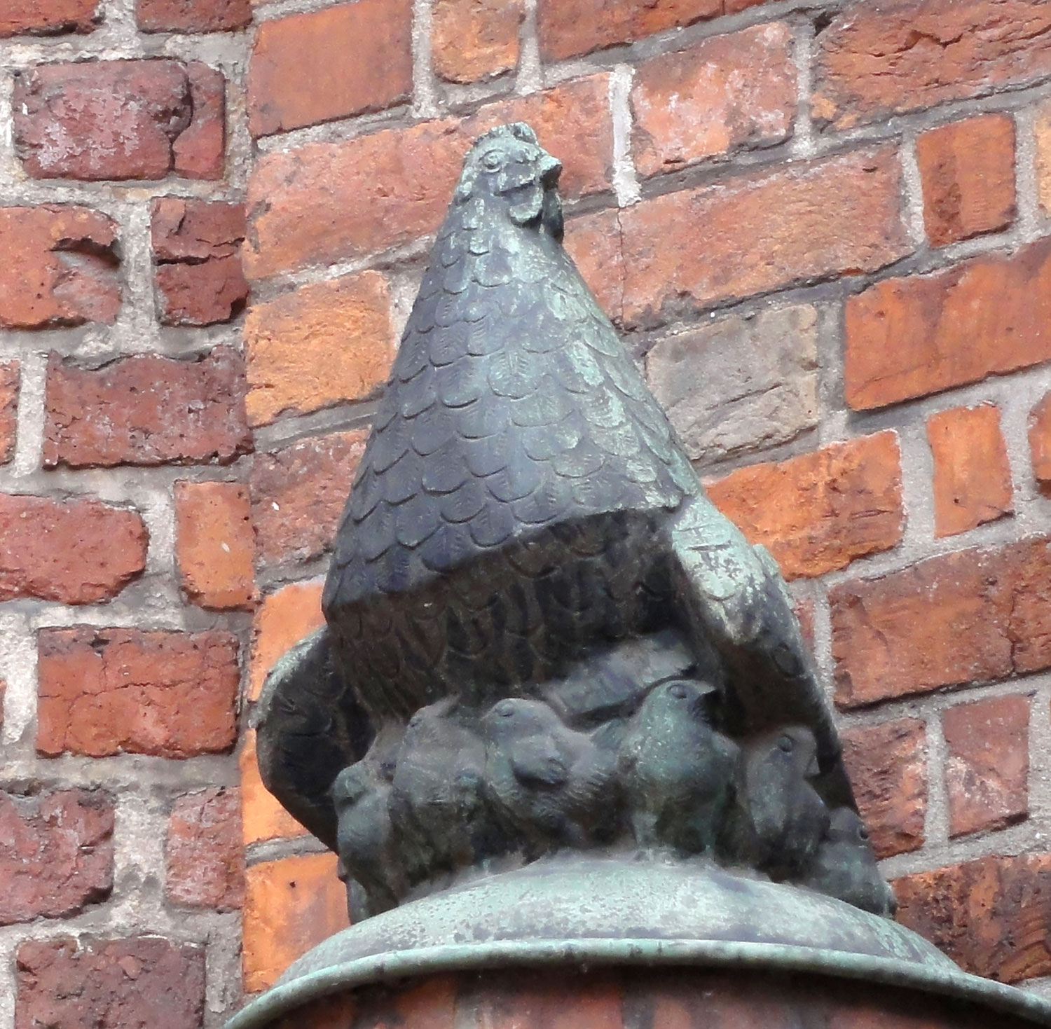 Böttcherstraße in Bremen: Skulptur Gluckhenne. Herstellung: 1958. Entwurf: Alfred Horling Das abgebildete Objekt ist ein geschütztes Kulturdenkmal in der Freien Hansestadt Bremen, mit der Nr. 1500,T002 beim Landesamt für Denkmalpflege registriert.